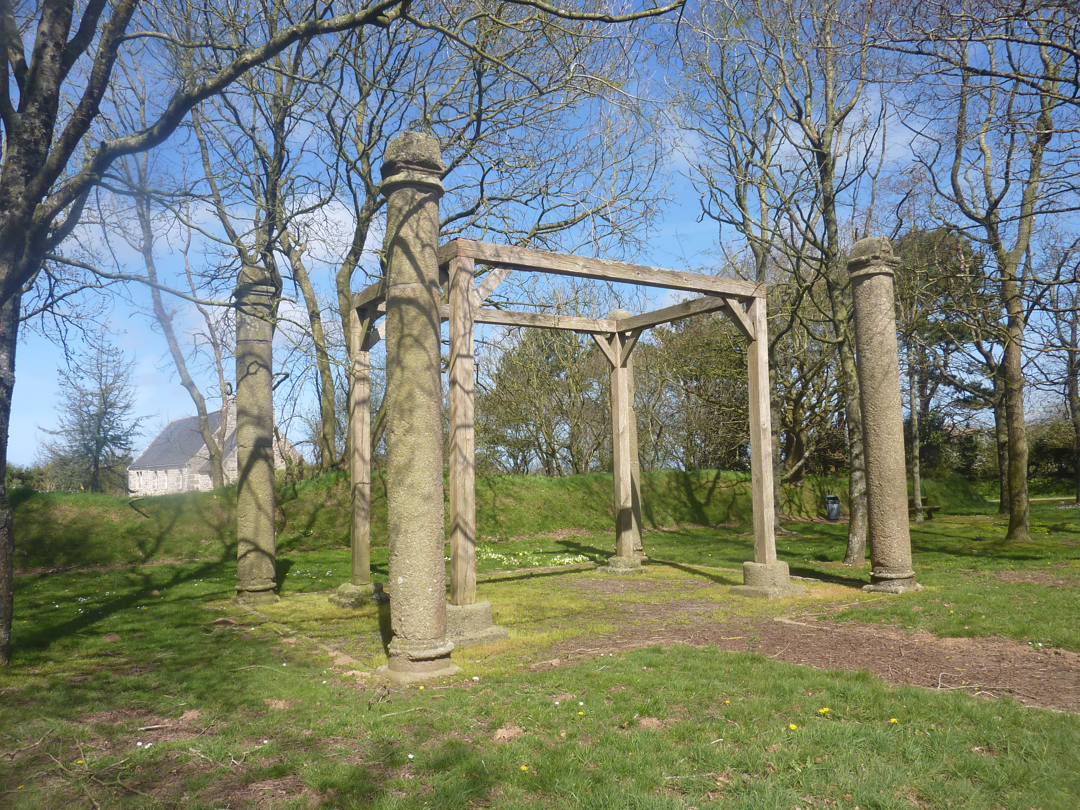 Plourin : les colonnes de justice (ou piliers de justice) près du hameau de Saint-Charles en Plourin (Finistère). Elles appartenaient aux seigneurs de Kergroadez (Kergroadès) qui disposaient du droit de haute justice et dateraient du XVIIe siècle.